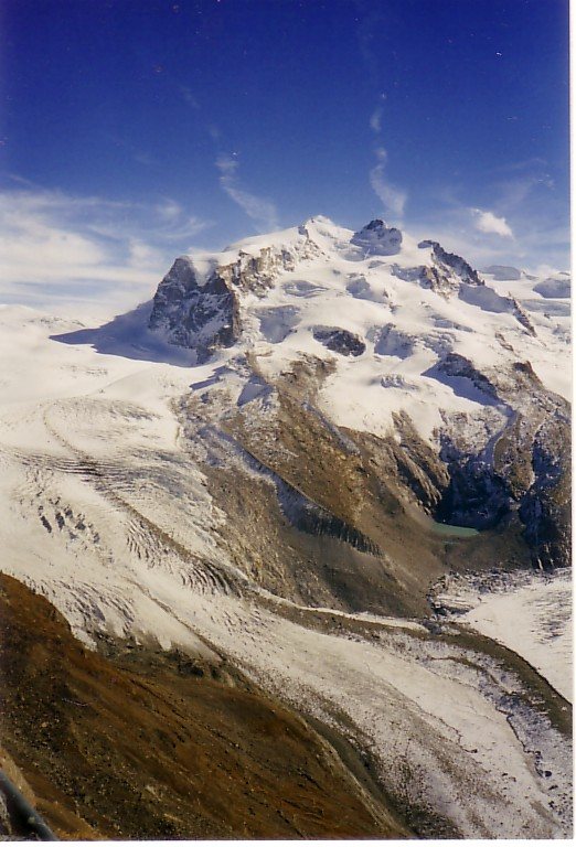 Der Gornergletscher vom Gornergrat aus gesehen. Im Hintergrund die Monte Rosa mit der Dufourspitze 4634m (höchster Berg der Schweiz).